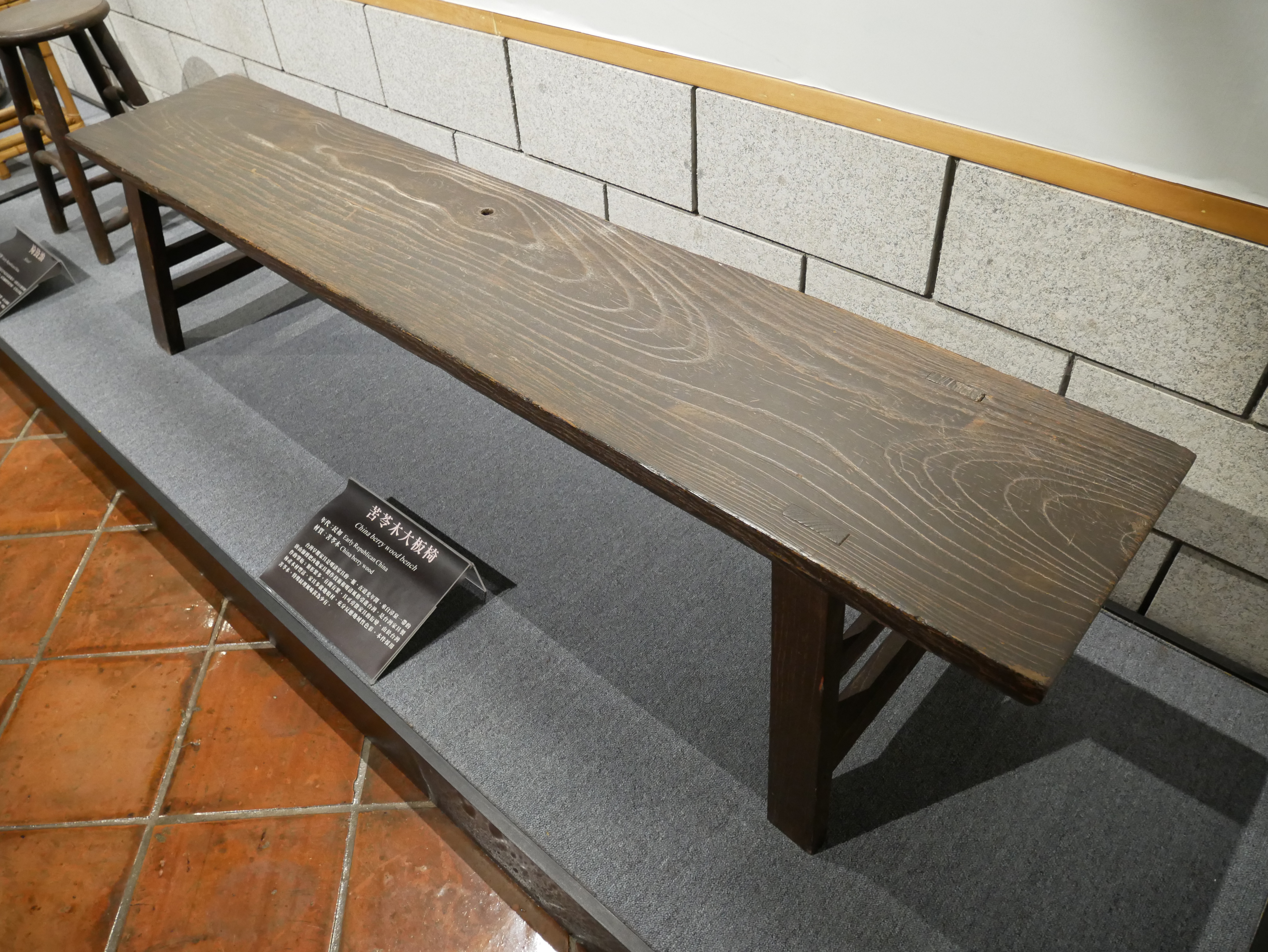 中文（台灣）: 苦苓木大板椅，桃園市桃園區市中次分區光興里